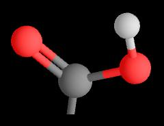 Image réalisée par moi-même à l'aide du logiciel Seemol (de ma propre conception).